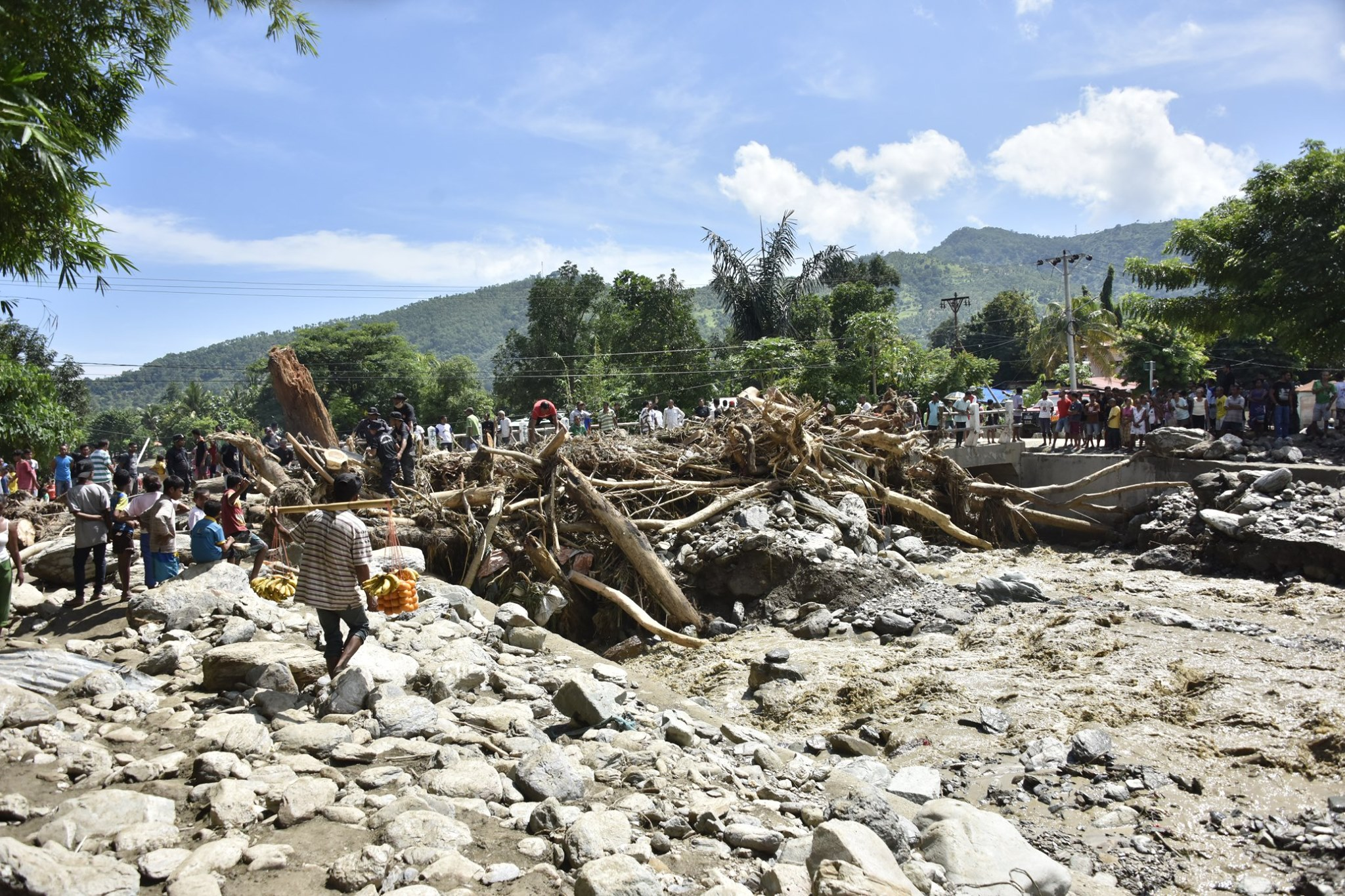 Flut in Dili, 13. März 2020